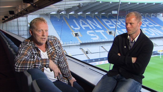 Arnór, junto a su hijo Eidur.